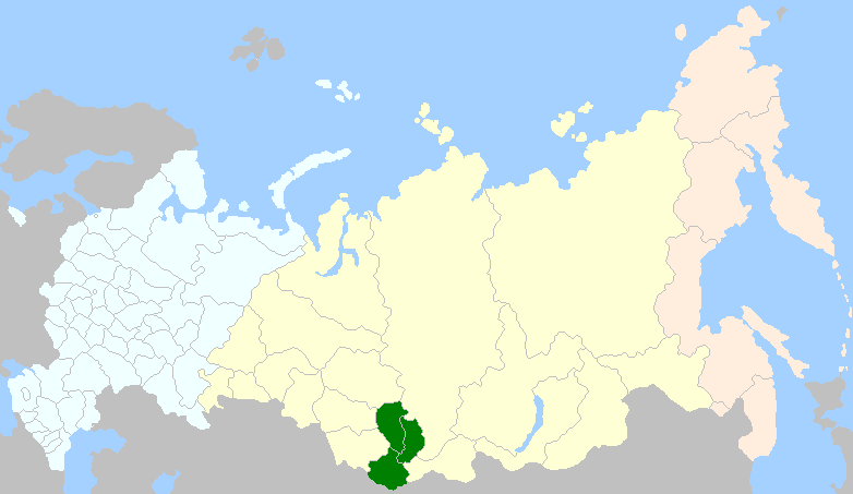 régions administratives occupées en 2008 par les Chors